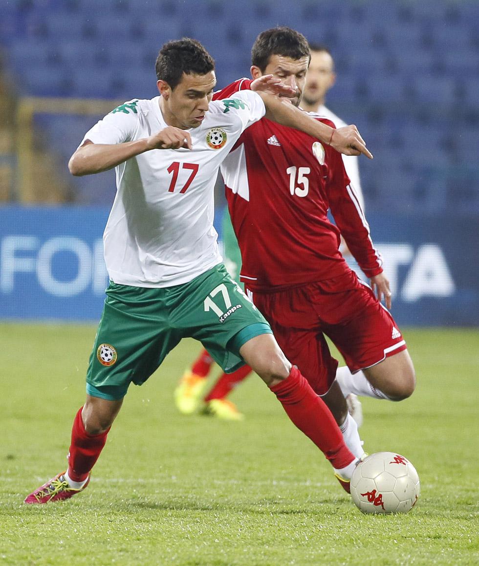 Георги Миланов - български футболист, състезател на ЦСКА (Москва)